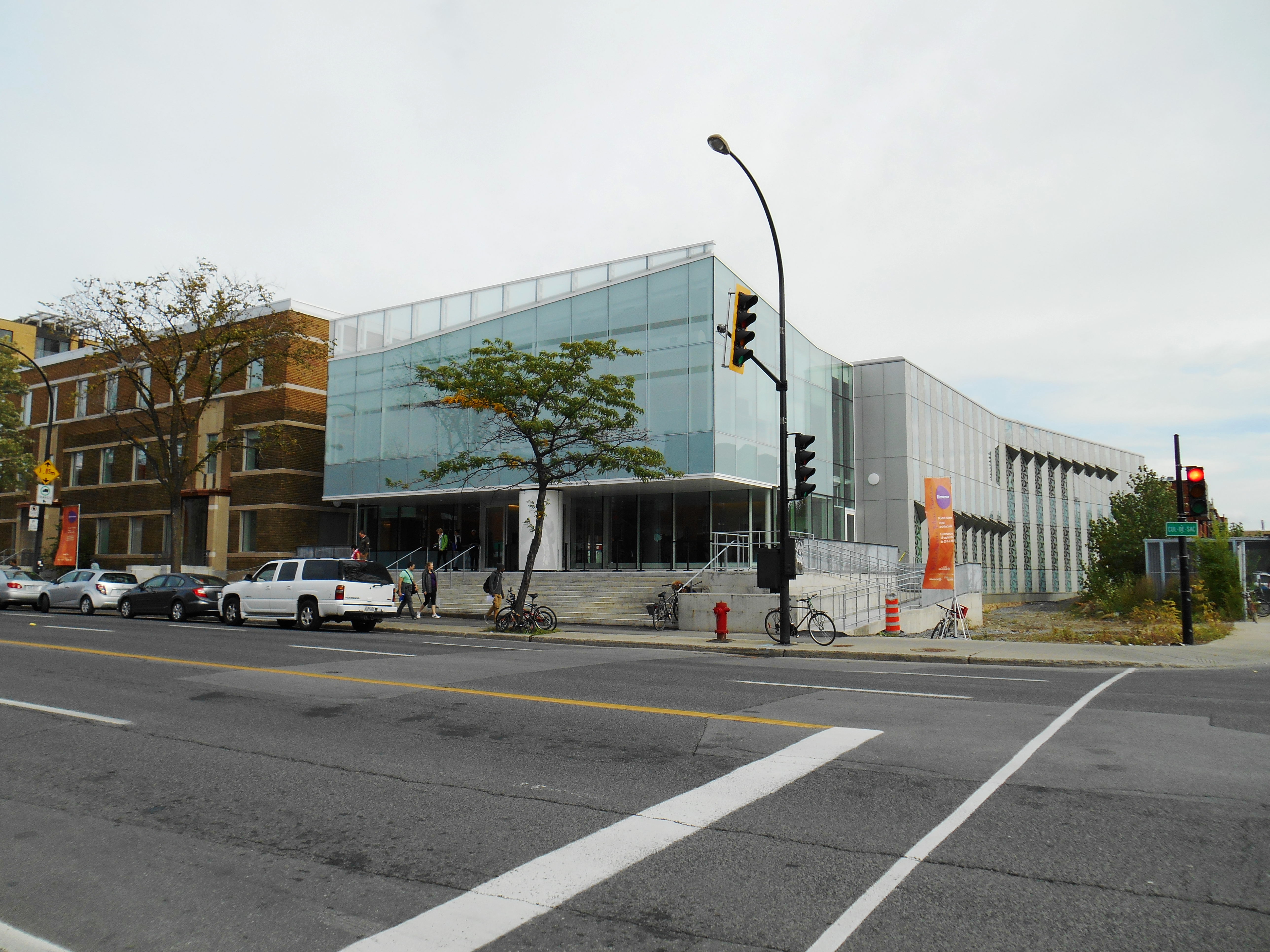 Bibliothèque Marc-Favreau, 500, boulevard Rosemont, Montréal, à deux pas de la station de métro Rosemont.